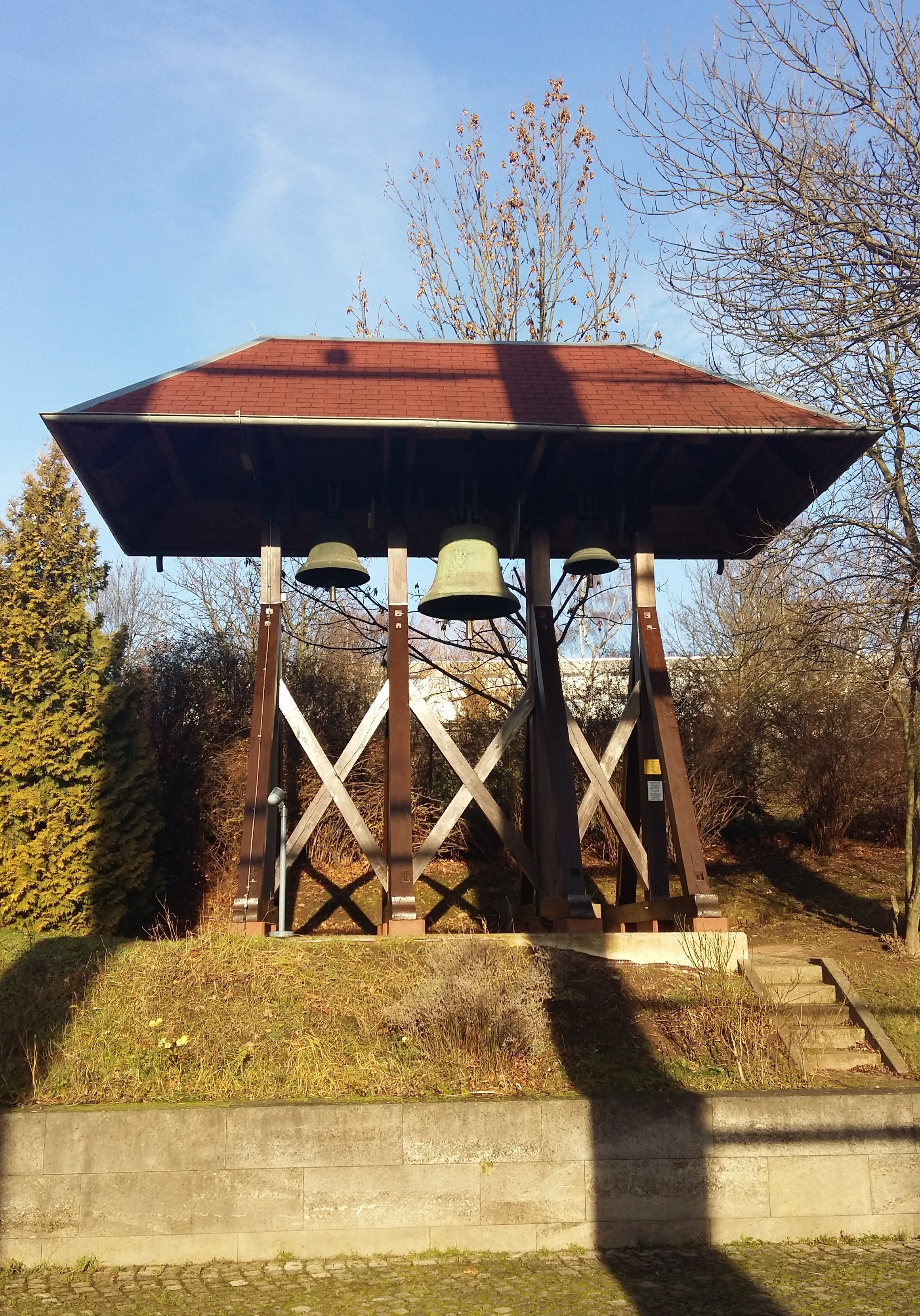 Geläut der Frauenbergkirche in Nordhausen